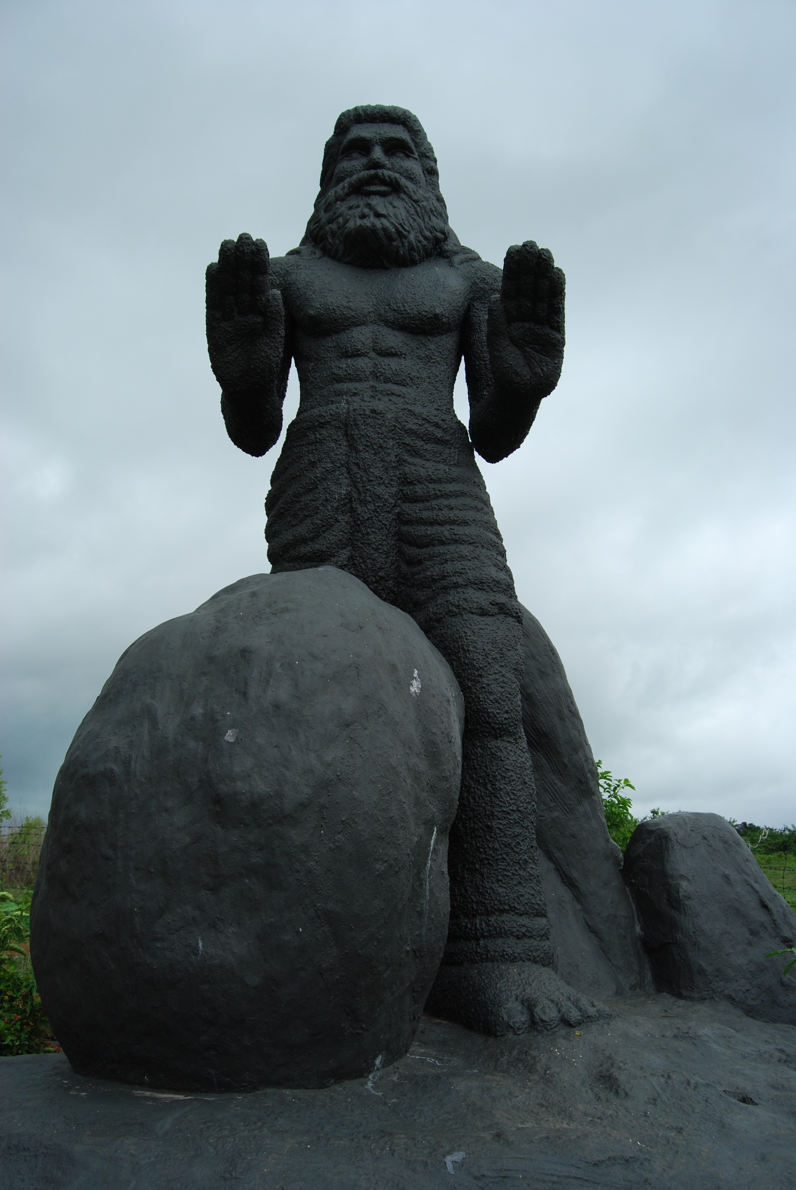 Naranathu bhanthan statue at rayiram kunnu